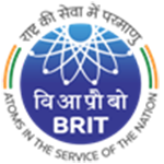 BRIT